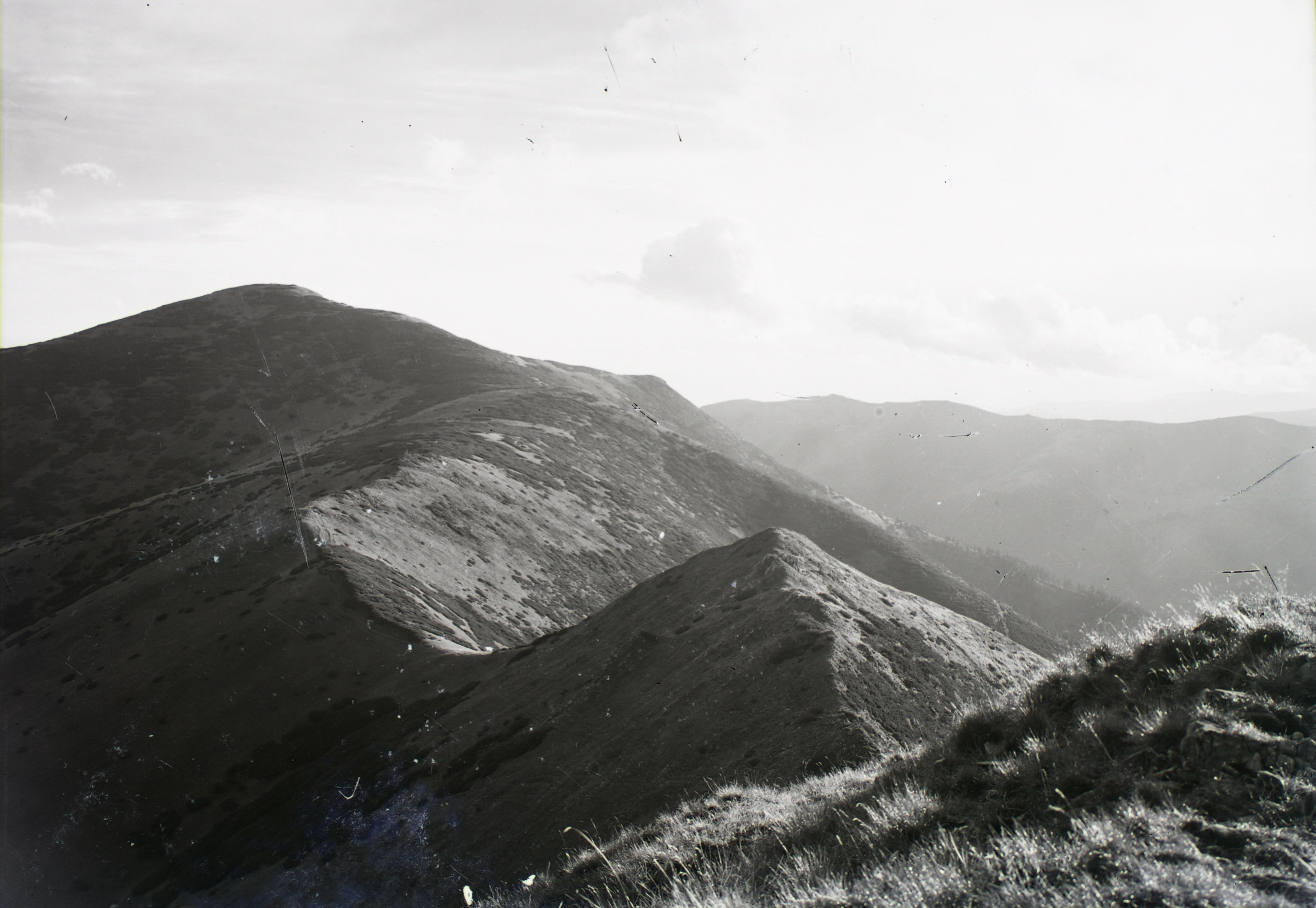 a Veľký Gápeľ csúcs a Gyömbér (Ďumbier) csúcsról nézve. Location: Slovakia Title: a Veľký Gápeľ csúcs a Gyömbér (Ďumbier) csúcsról nézve.